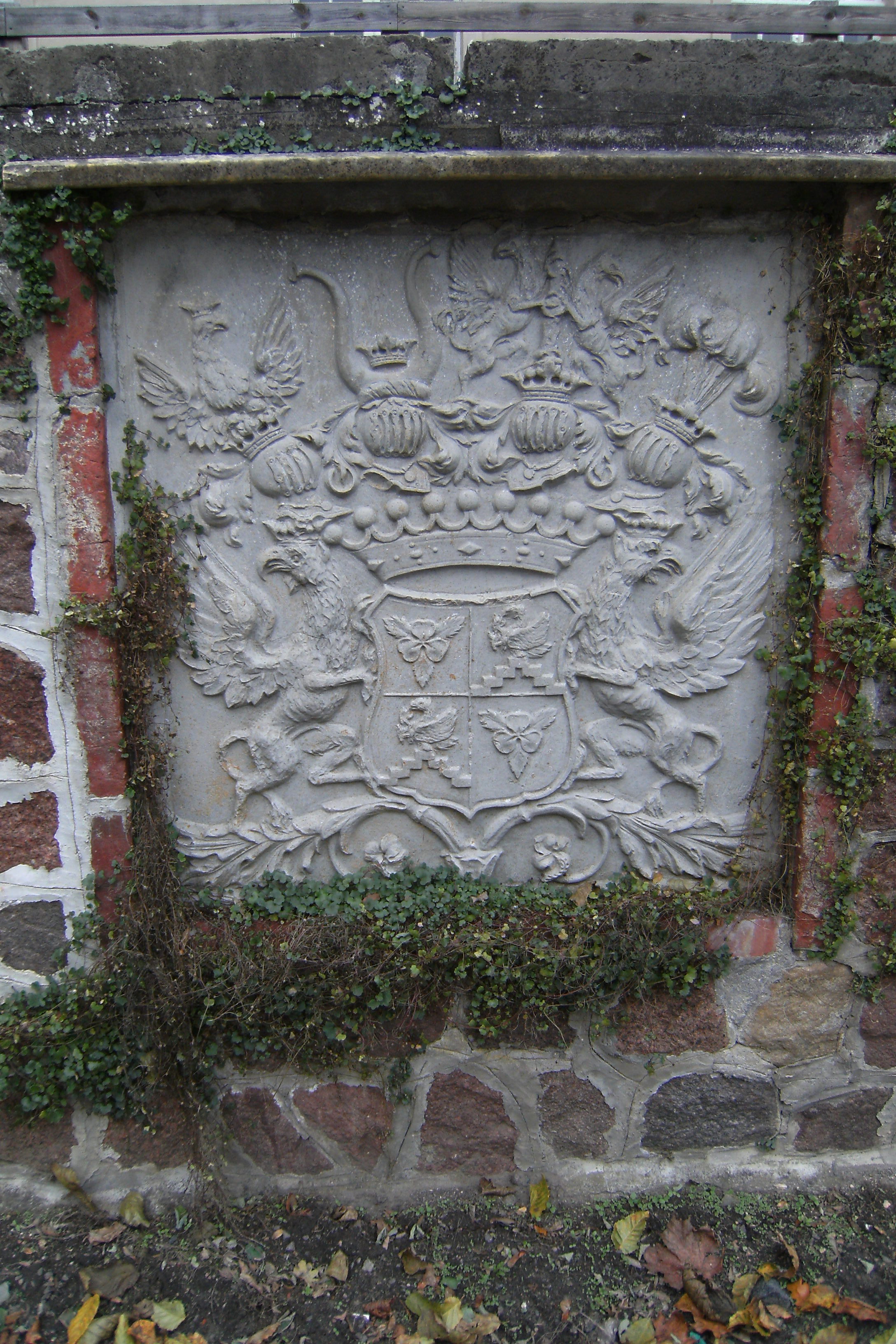 Wappenstein Bismarck-Bohlen am Karlsburger Schloss